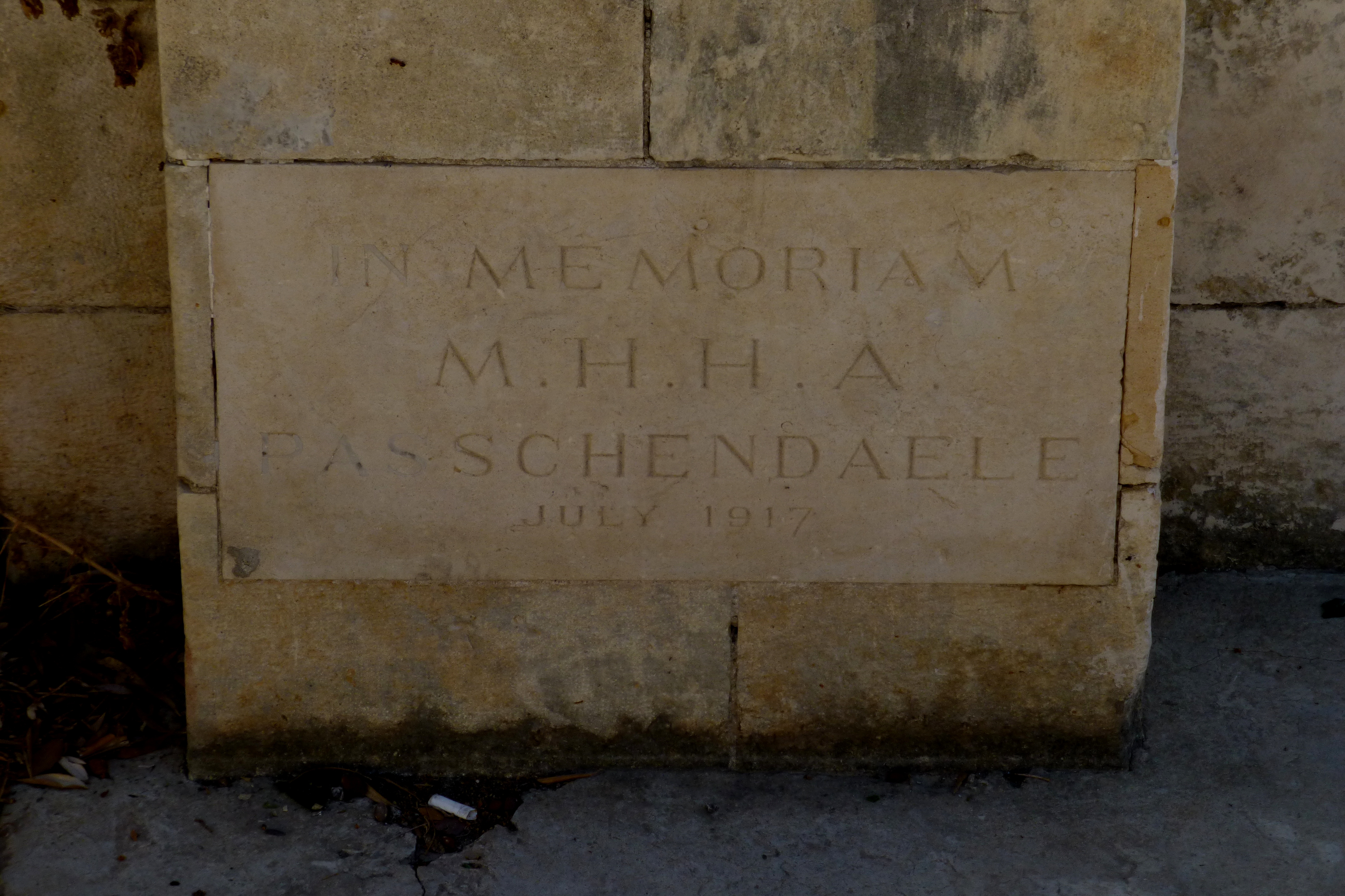 גן אלנבי - רח' יפה נוף 120, מרכז הכרמל, חיפה. שלט לזכרו של מייקל אלנבי, בנו של אדמונד אלנבי